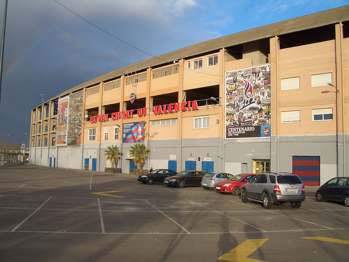 Fachada del estadio Ciutat de València